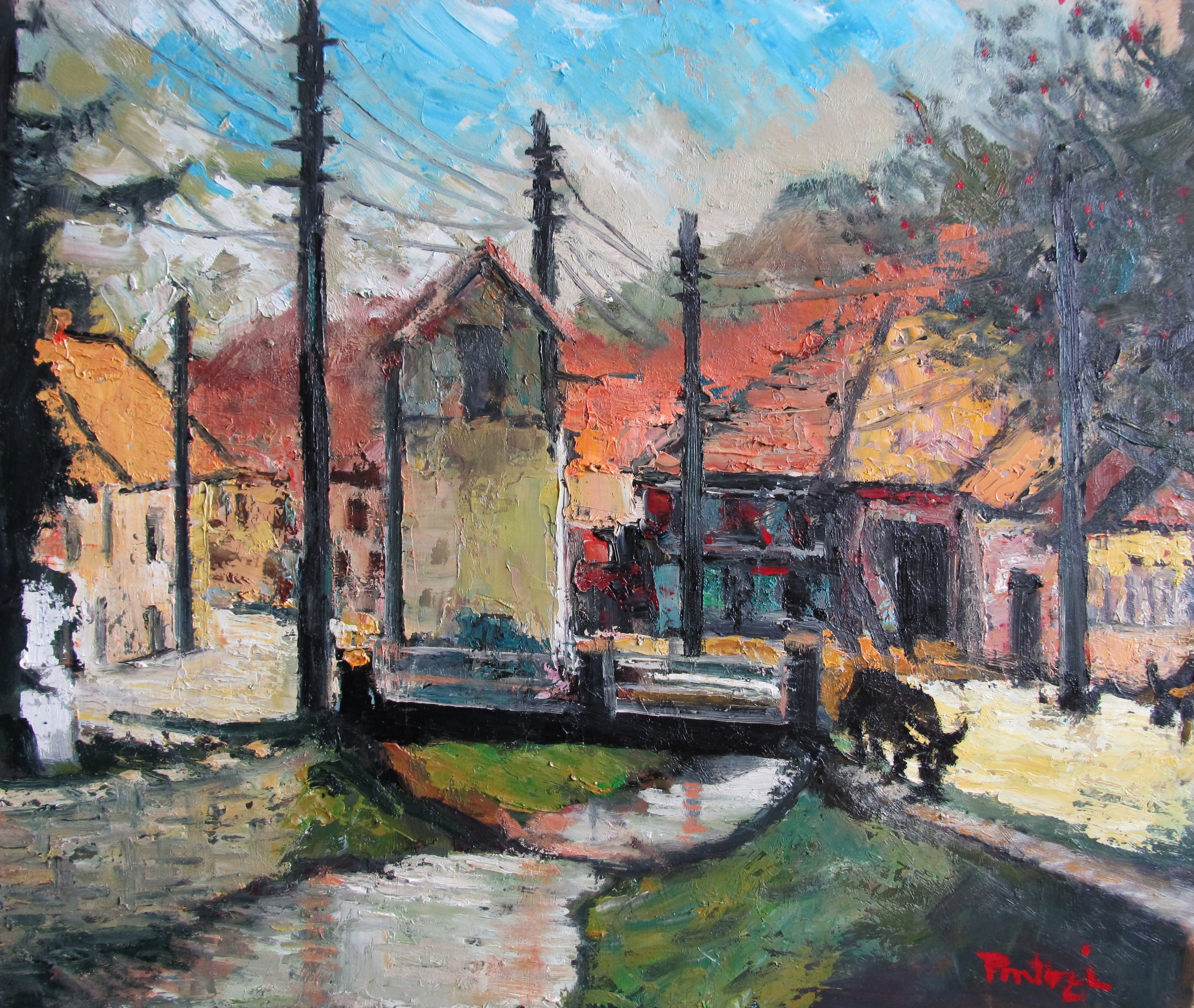 Valeriu Pantazi - Peisaj din Comuna Racovita, Sibiu